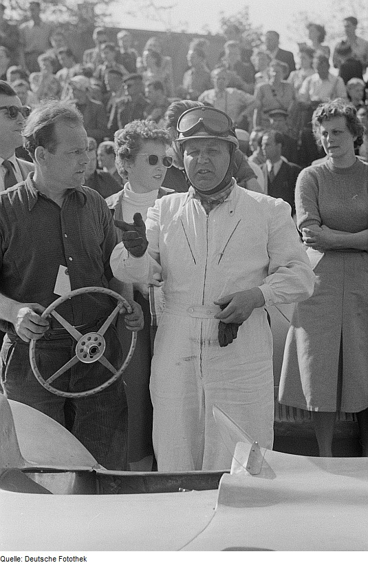 Original image description from the Deutsche Fotothek Portrait Arthur Rosenhammers sowie weiterer Personen beim 6. Leipziger Stadtparkrennen